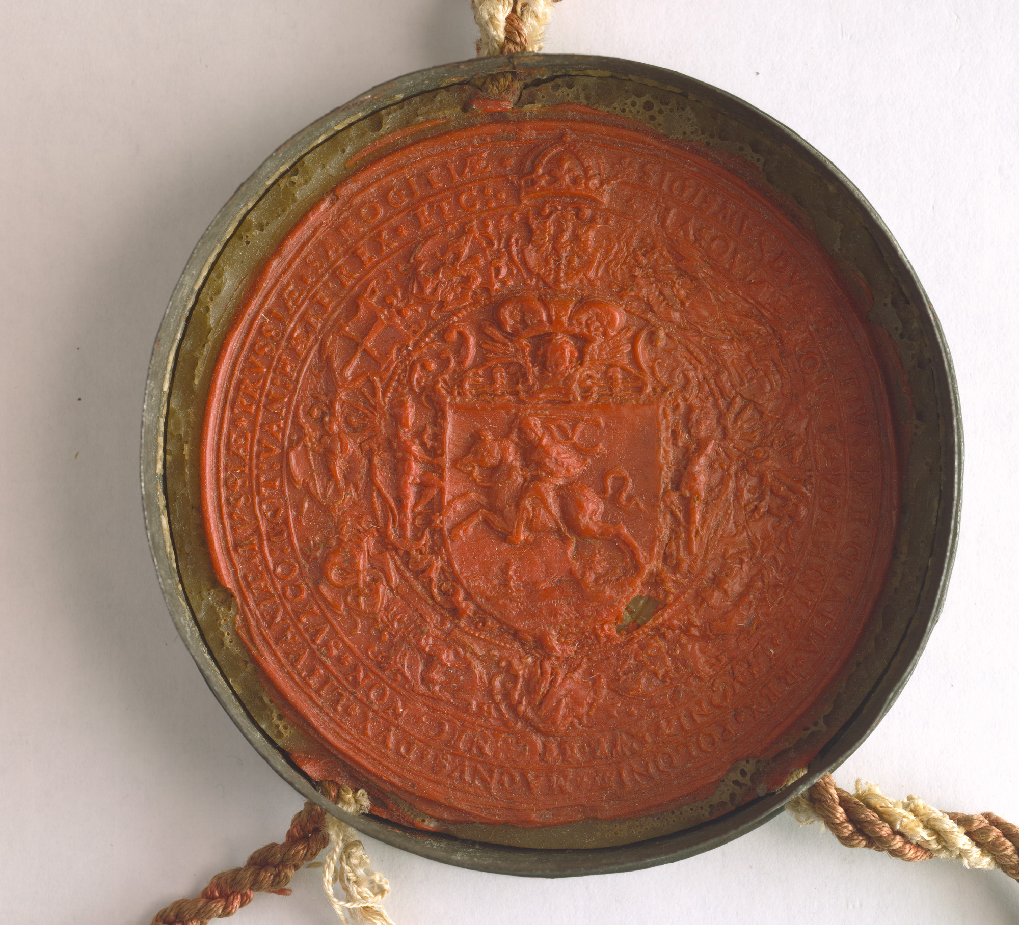 Akt nadania przez Zygmunta III Wazę, króla polskiego, urzędu kanclerza litewskiego Albertowi Stanisławowi Radziwiłłowi, podkanclerzemu litewskiemu, wystawiony 6 lutego 1623 roku w Warszawie. Dokument pergaminowy o wymiarach 66 x 34,5 z pieczęcią Wielkiego Księstwa Litewskiego. Jest to tak zwana pieczęć wielka litewska.